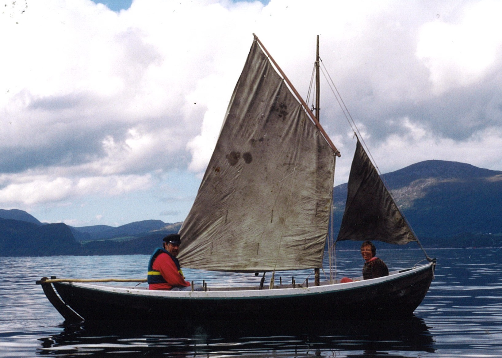 Ranaspisse